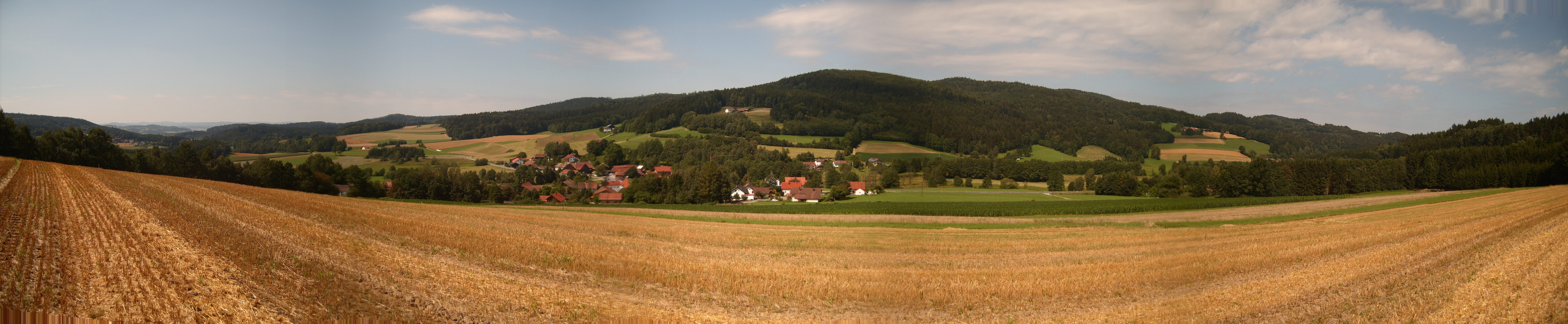 Balbersdorf, Ansicht mit Blickrichtung Westen